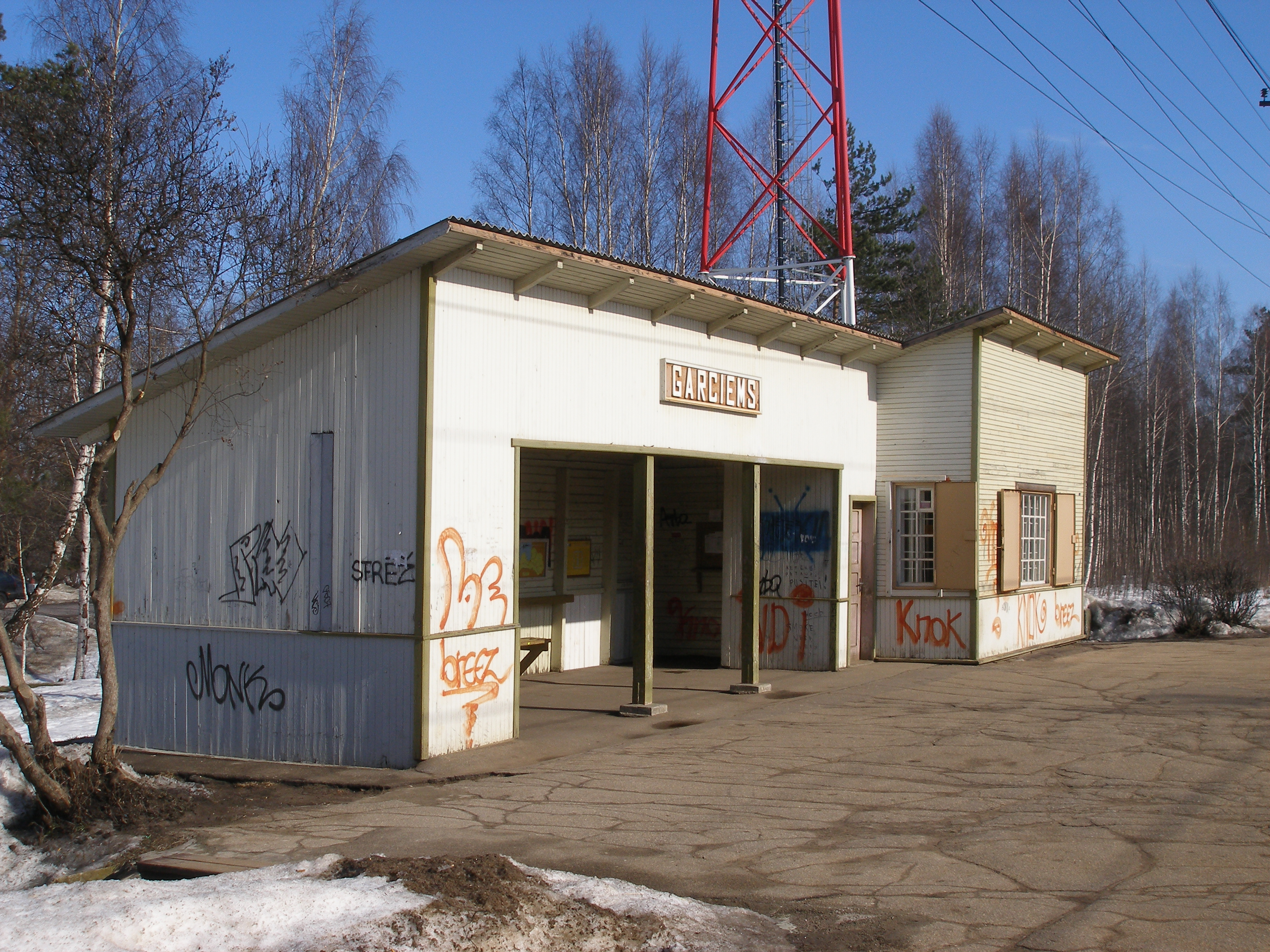 Garciema stacija